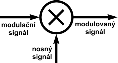 Schematická značka jednoduchého modulátoru